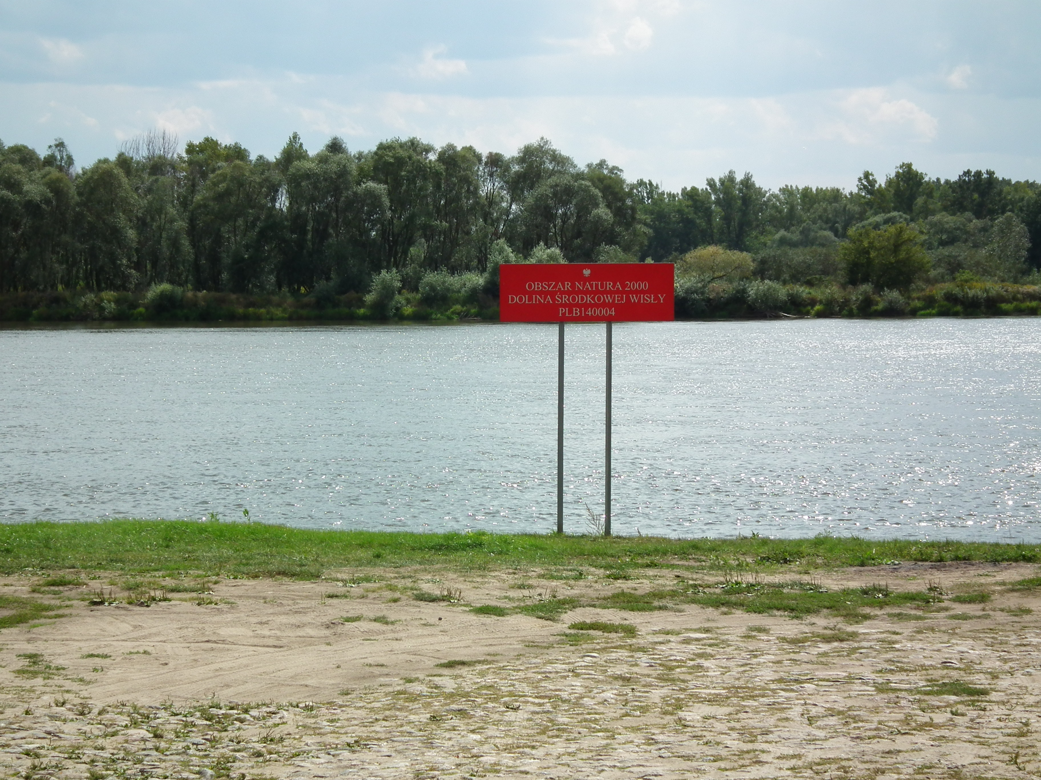 Czerwińsk Nad Wisłą - miejsce po moście łyżwowym z 1410r.